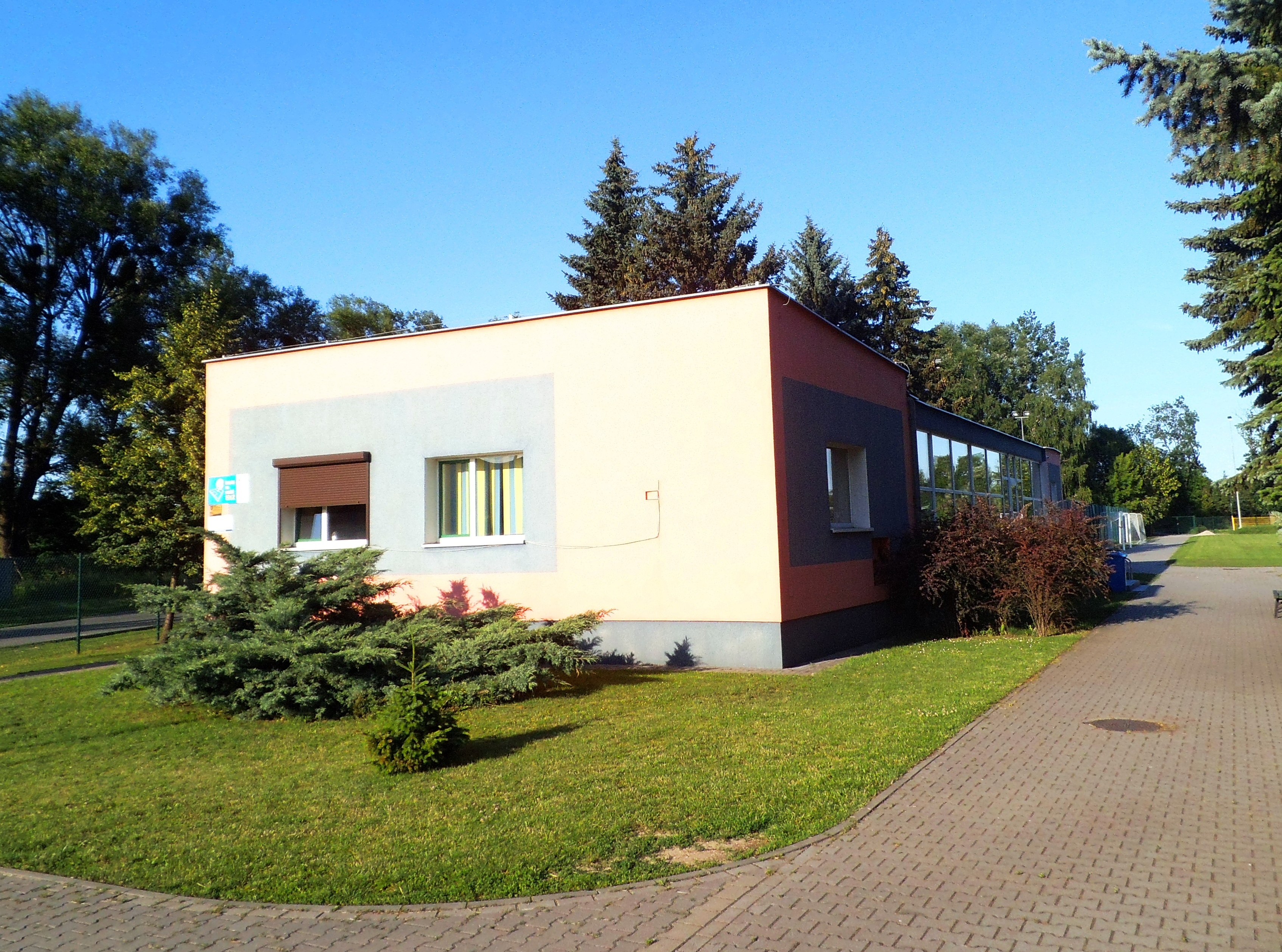 Centrum Sportowo-Rekreacyjne przy ul. 63 Pułku Piechoty w Toruniu